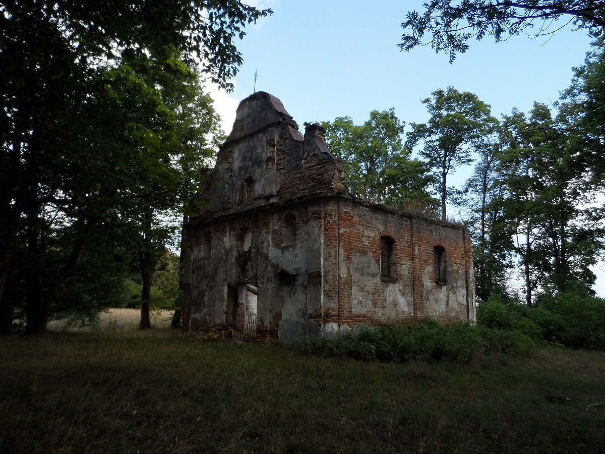 Язвіны. Касцёл Святога Духа